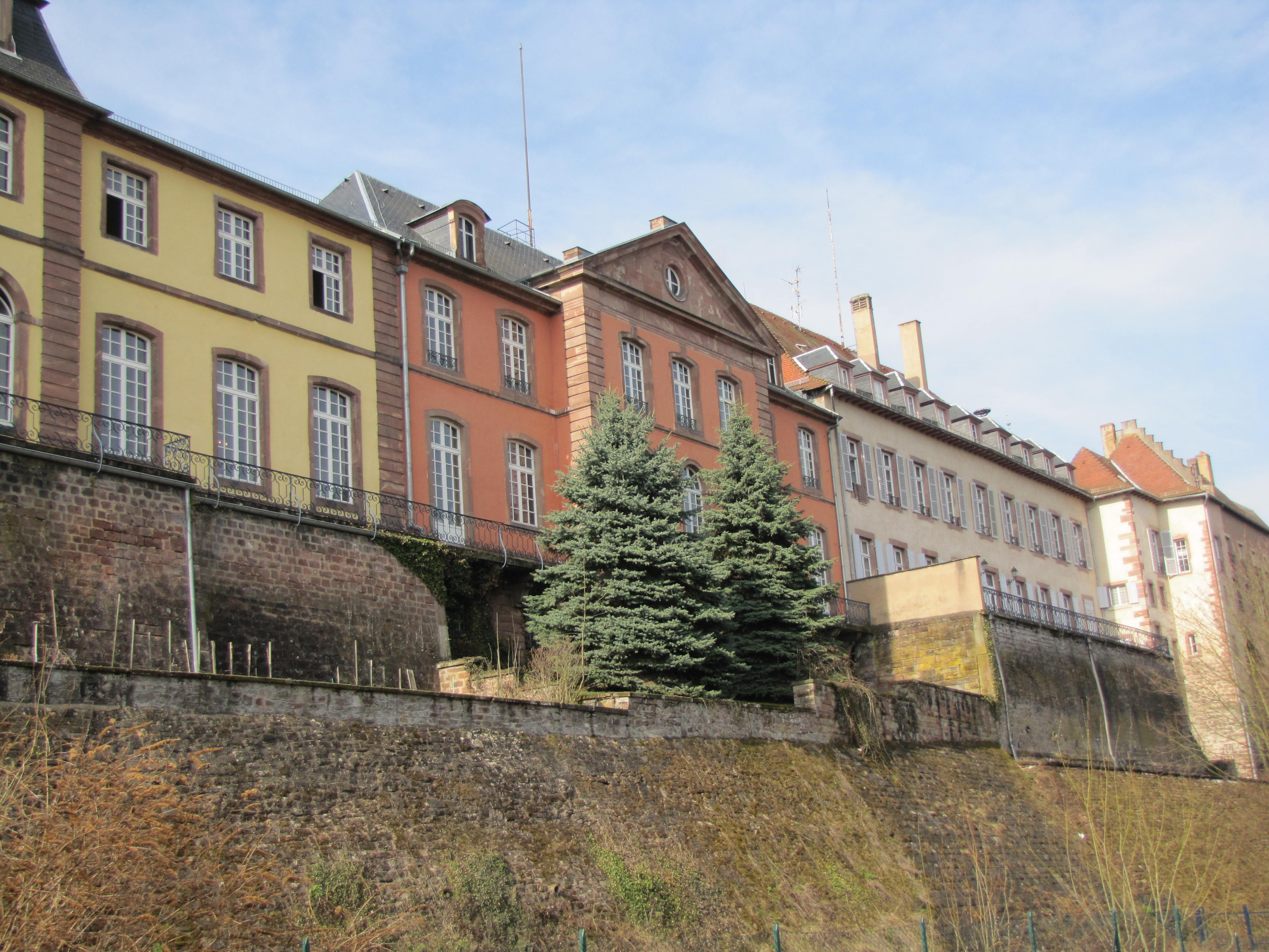 Alsace, Bas-Rhin, Saverne, Ancienne Chancellerie épiscopale (1738), aujourd'hui Tribunal: .